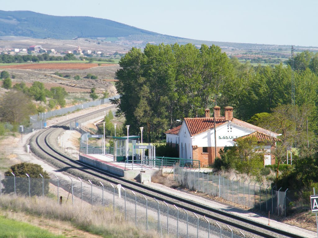 Estacion de Badules tras su reforma y adecuación, fundamentalmente en su andén.